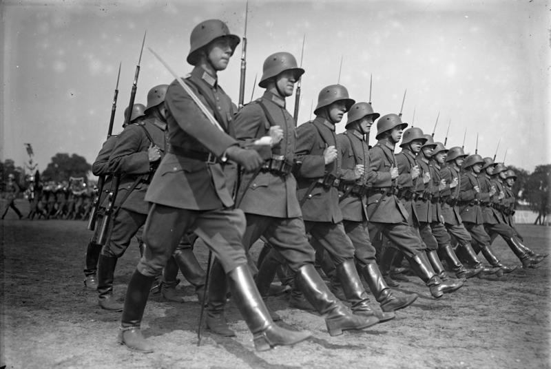 10 Jahre deutsche Reichswehr! Am 1. Januar 1931 werden es 10 Jahre , dass die deutsche Reichswehr neu geschaffen wurde. Ein musterhafter Parademarsch der deutschen Reichswehr anlässlich eines Vorbeimarsches vor dem Reichspräsidenten von Hindenburg.